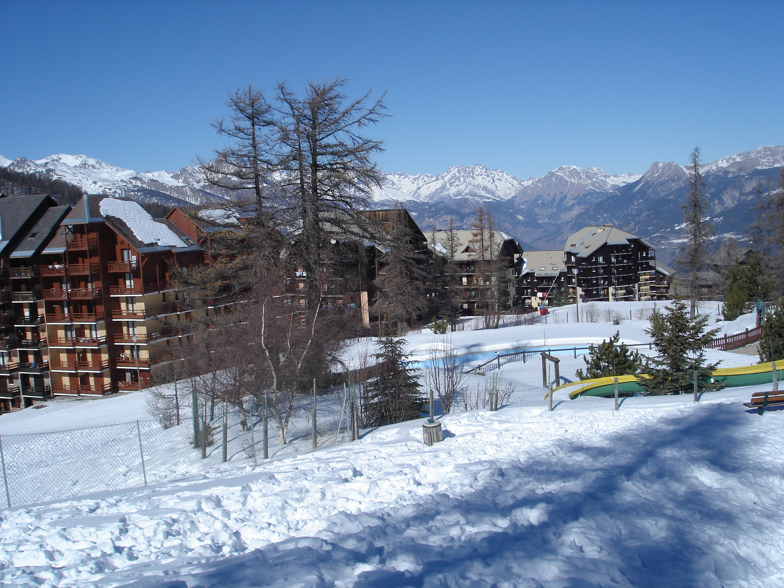 (Ville de Risoul-Hautes-Alpes) Auteur : Jean-Claude Perez